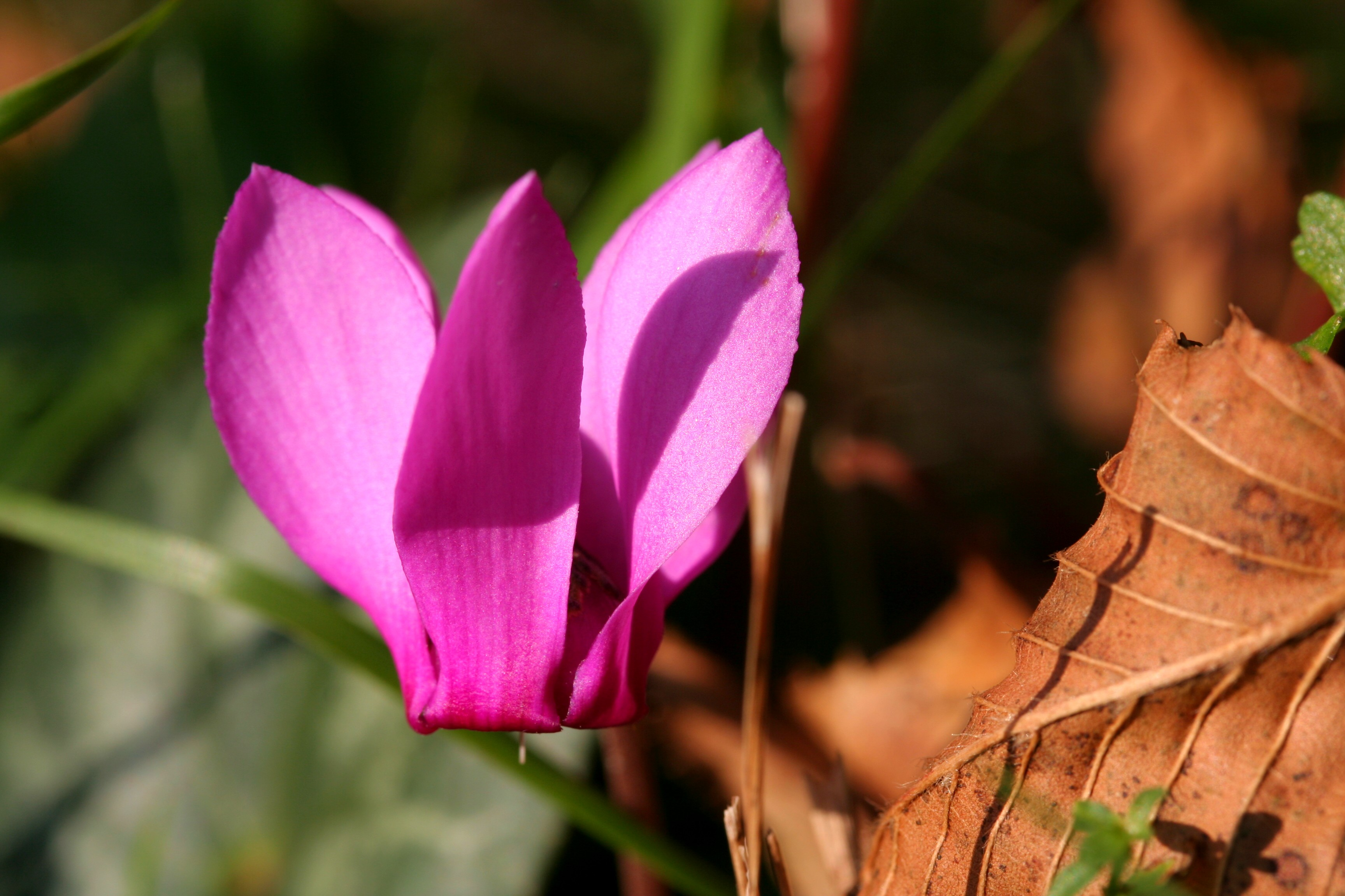 Cyclamen_purpurascens (Ciclamino delle Alpi) Località Barp (BL) 700 m s.l.m. 14/10/2007